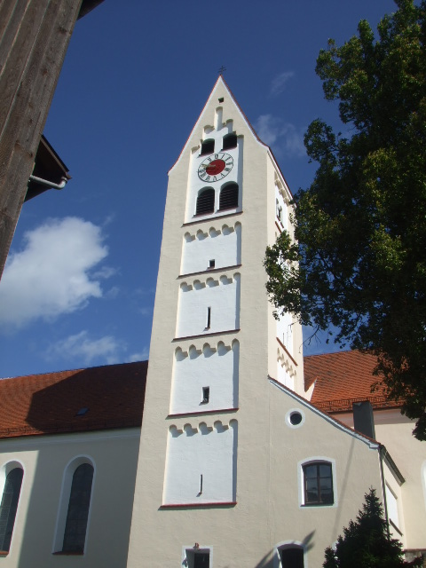 Kath. Pfarrkirche St. Martin, Breitenbrunn, Landkreis Unterallgäu Turm